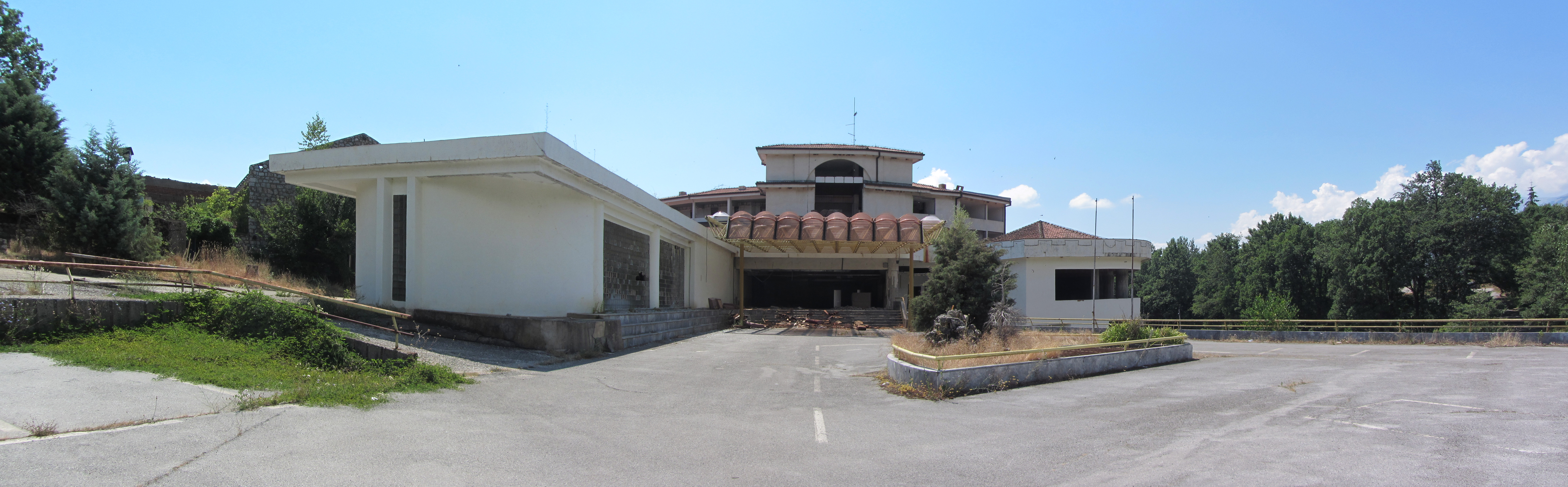 Oteševo, Macedonia